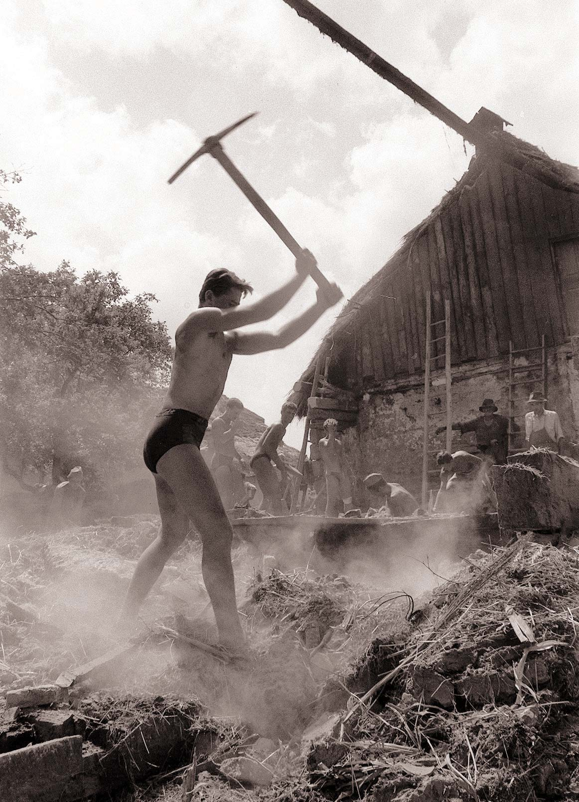 Rekonstrukcija stare ceste pri Lenartu v Slovenskih goricah in pri Benediktu.